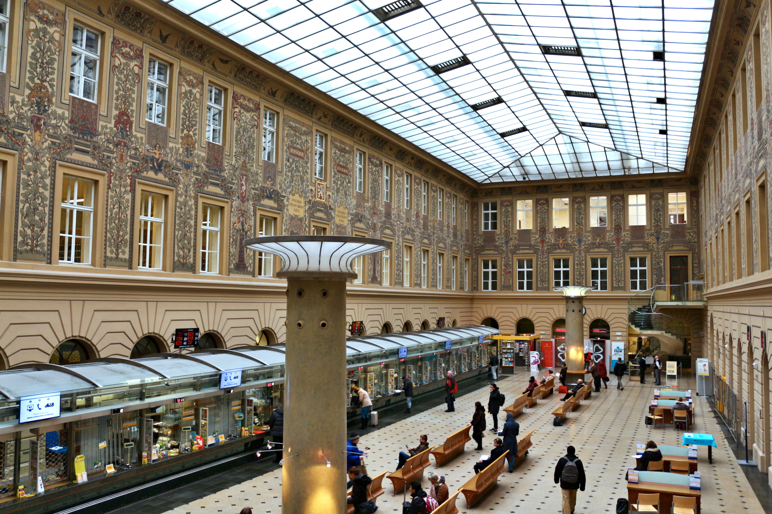 Hlavní pošta (Praha, Jindřišská)